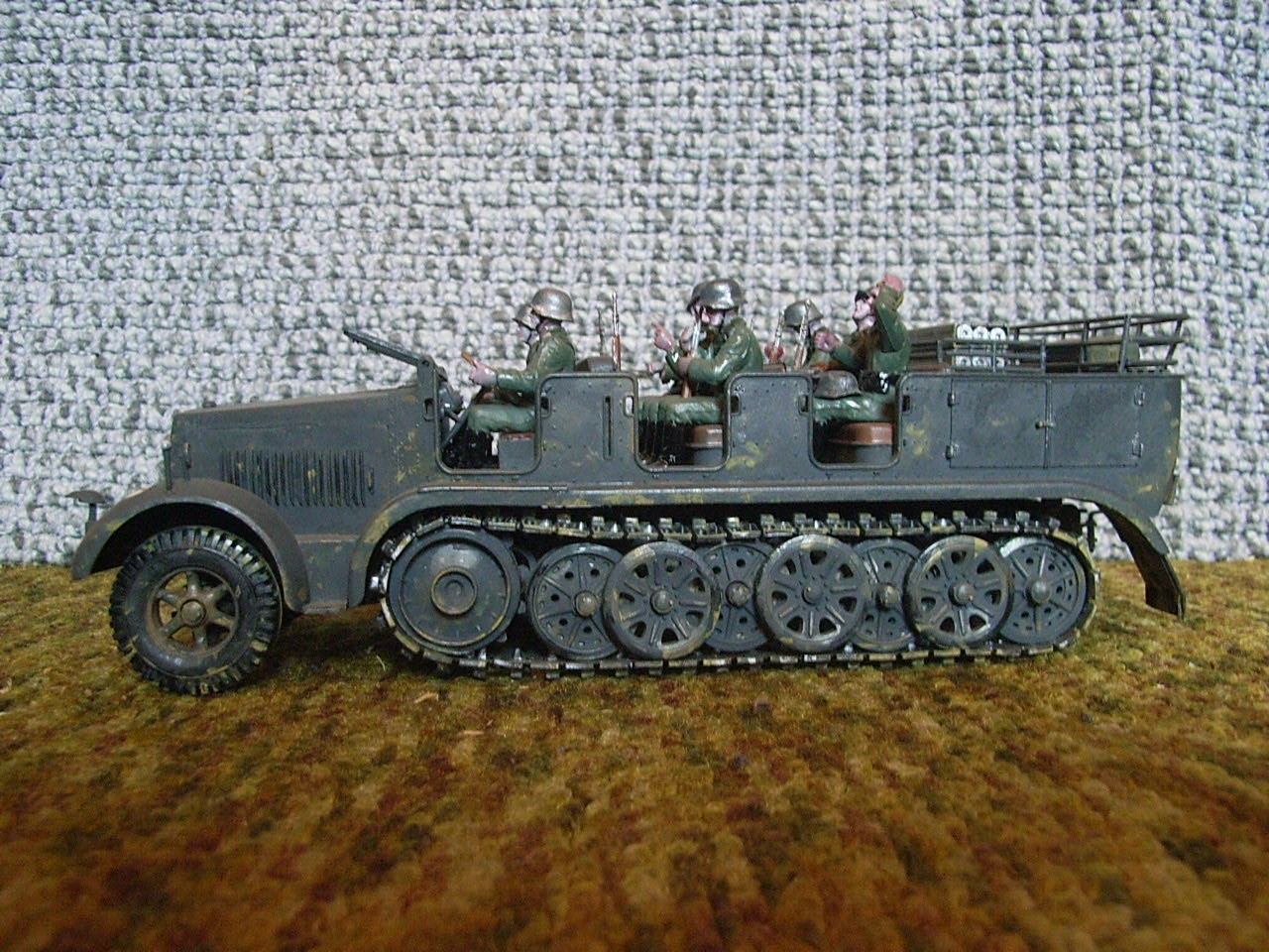 Sd.Kfz.7 (Modell)